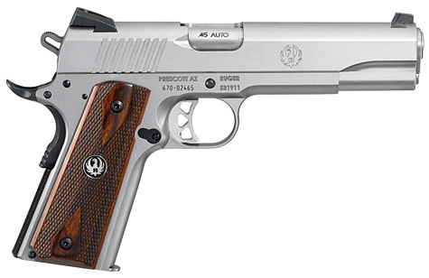 Ruger SR-1911 Semi-automatic pistol